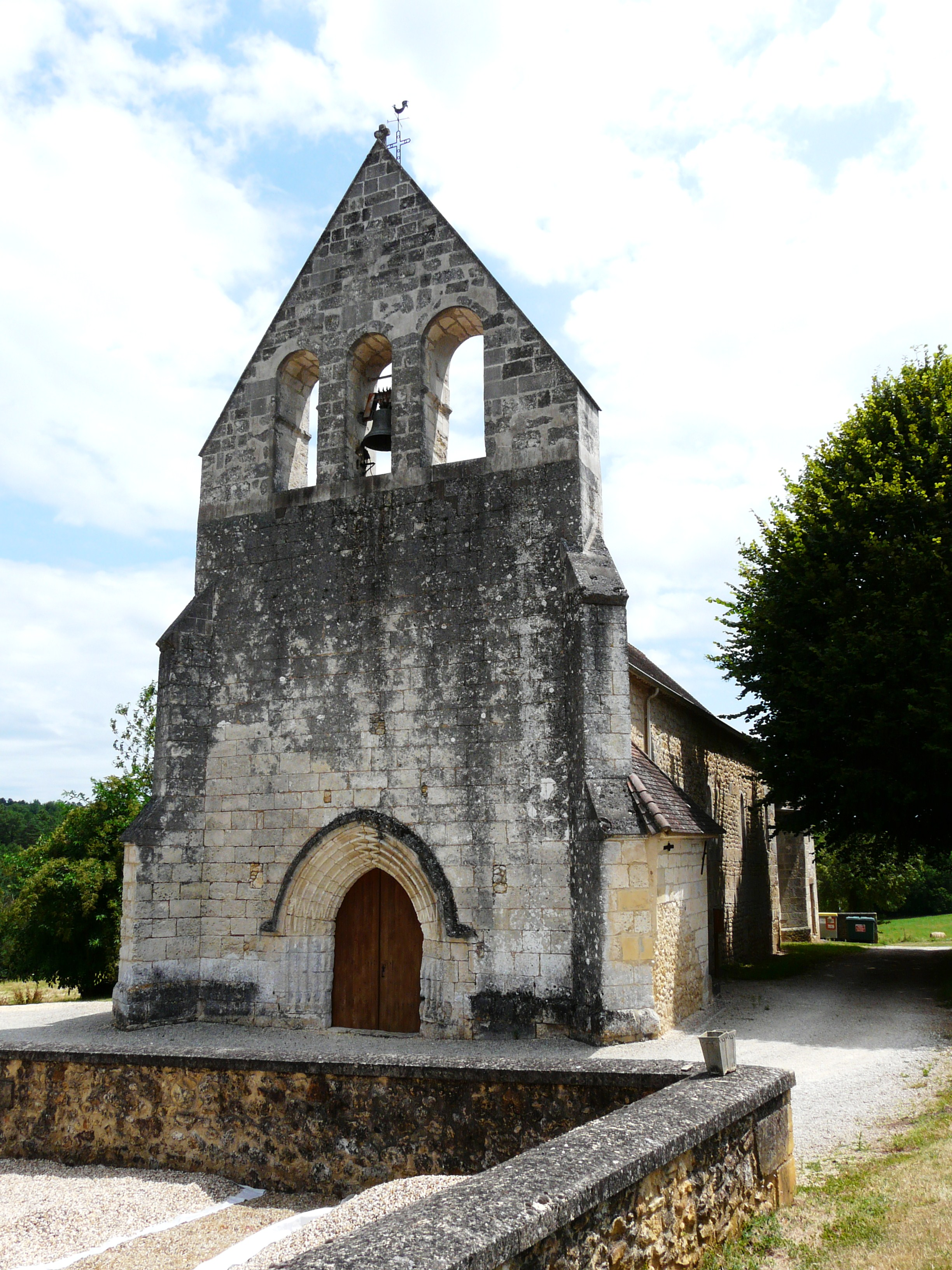 L'église Saint-Julien, Saint-Julien-de-Crempse, Dordogne, France